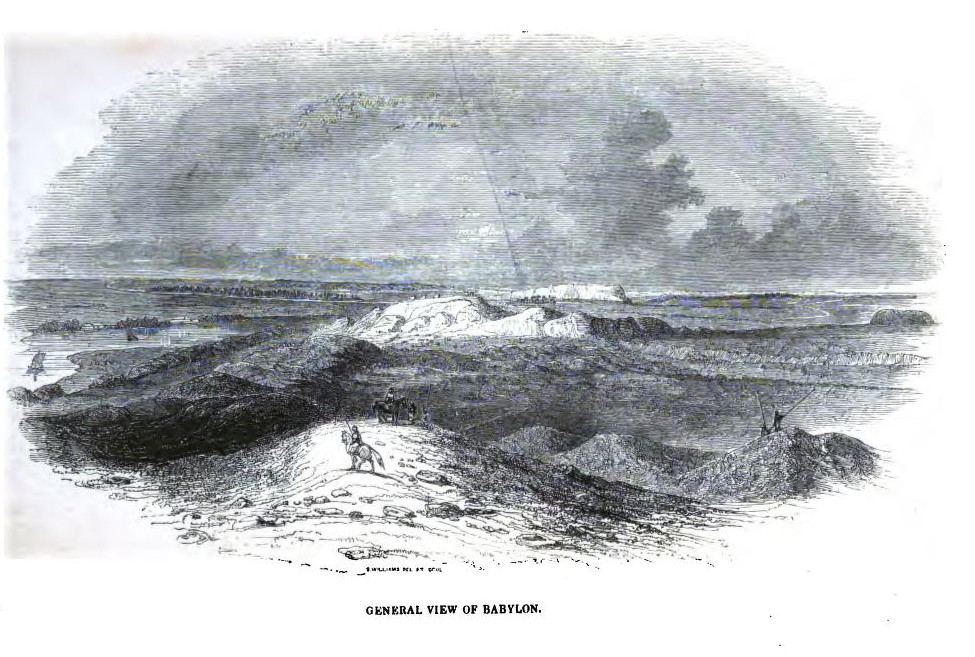 Gesamtansicht von Babylon – Zeichnung Rich 1811